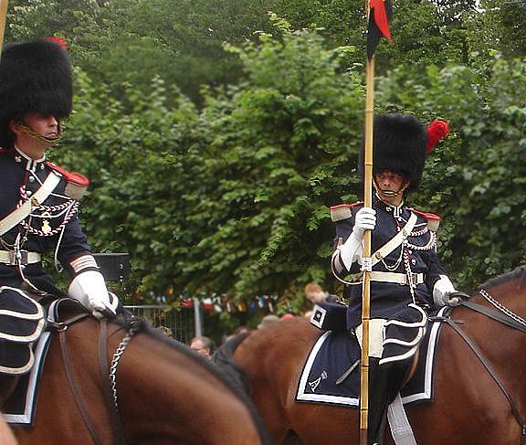 Kon Escorte